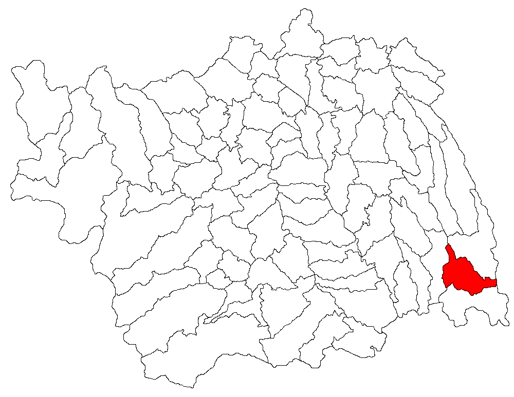 Categorie:Hărţi ale judeţului Bacău